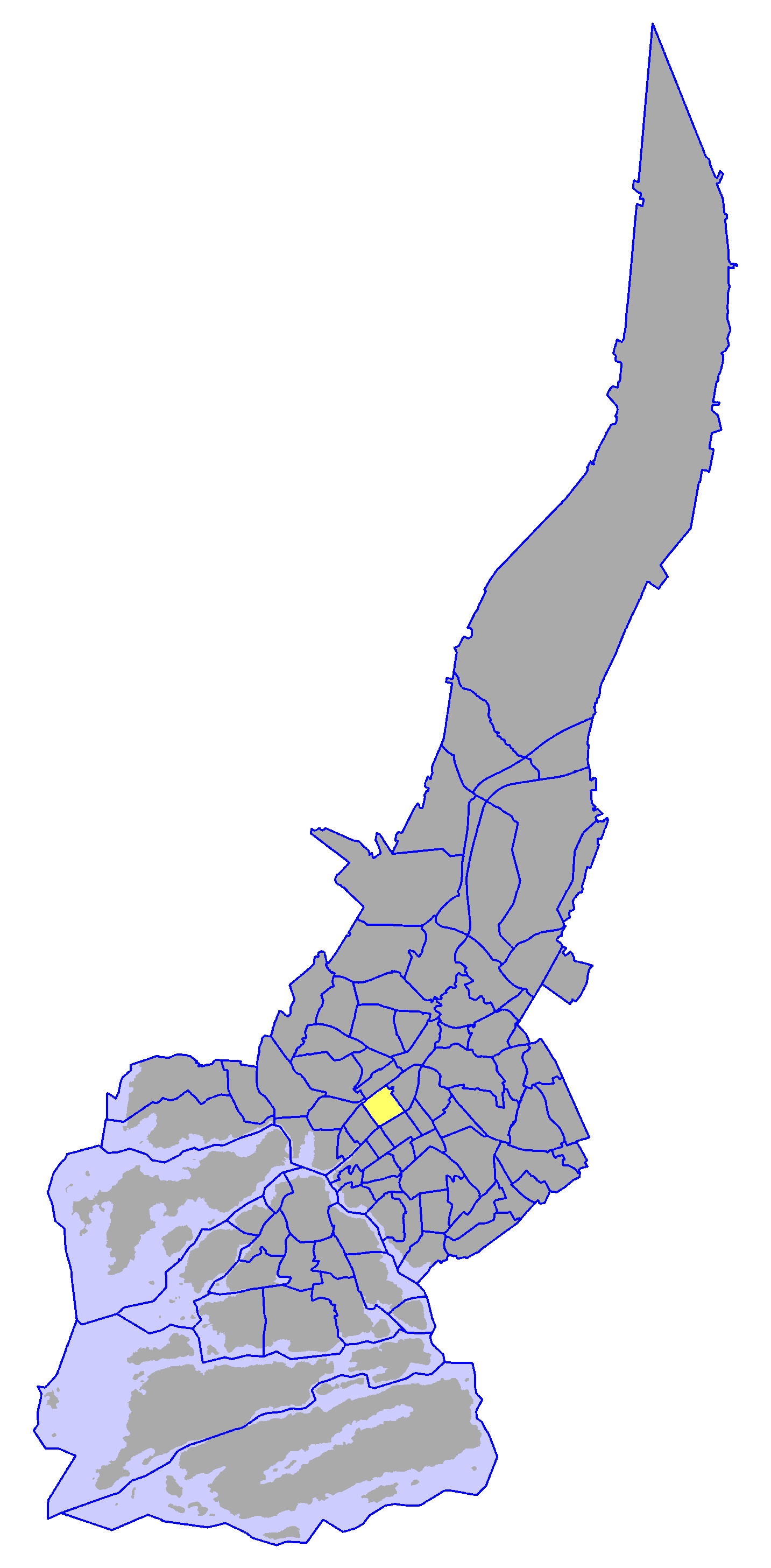 District number VII, in Turku